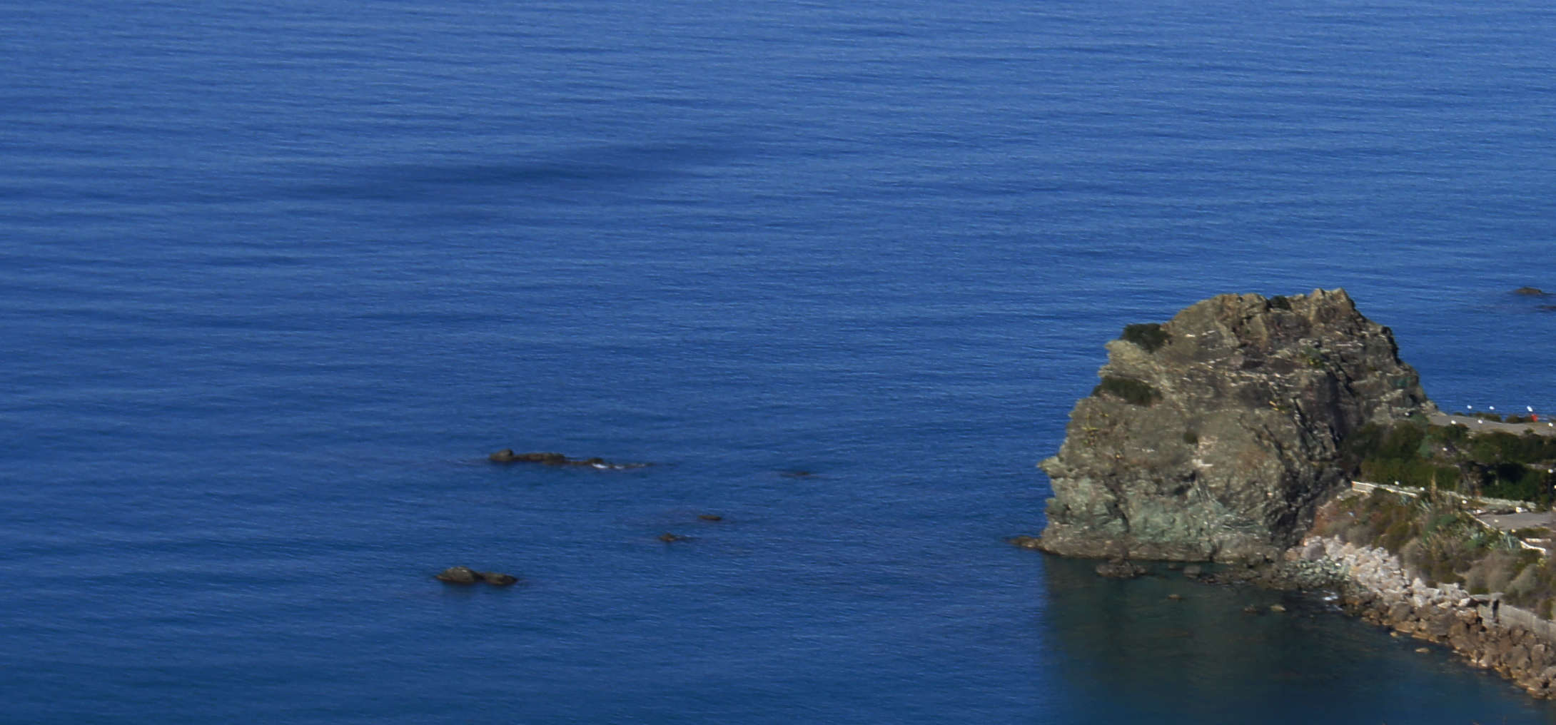 Scogli di Coreca visti dal Colle degli Ulivi